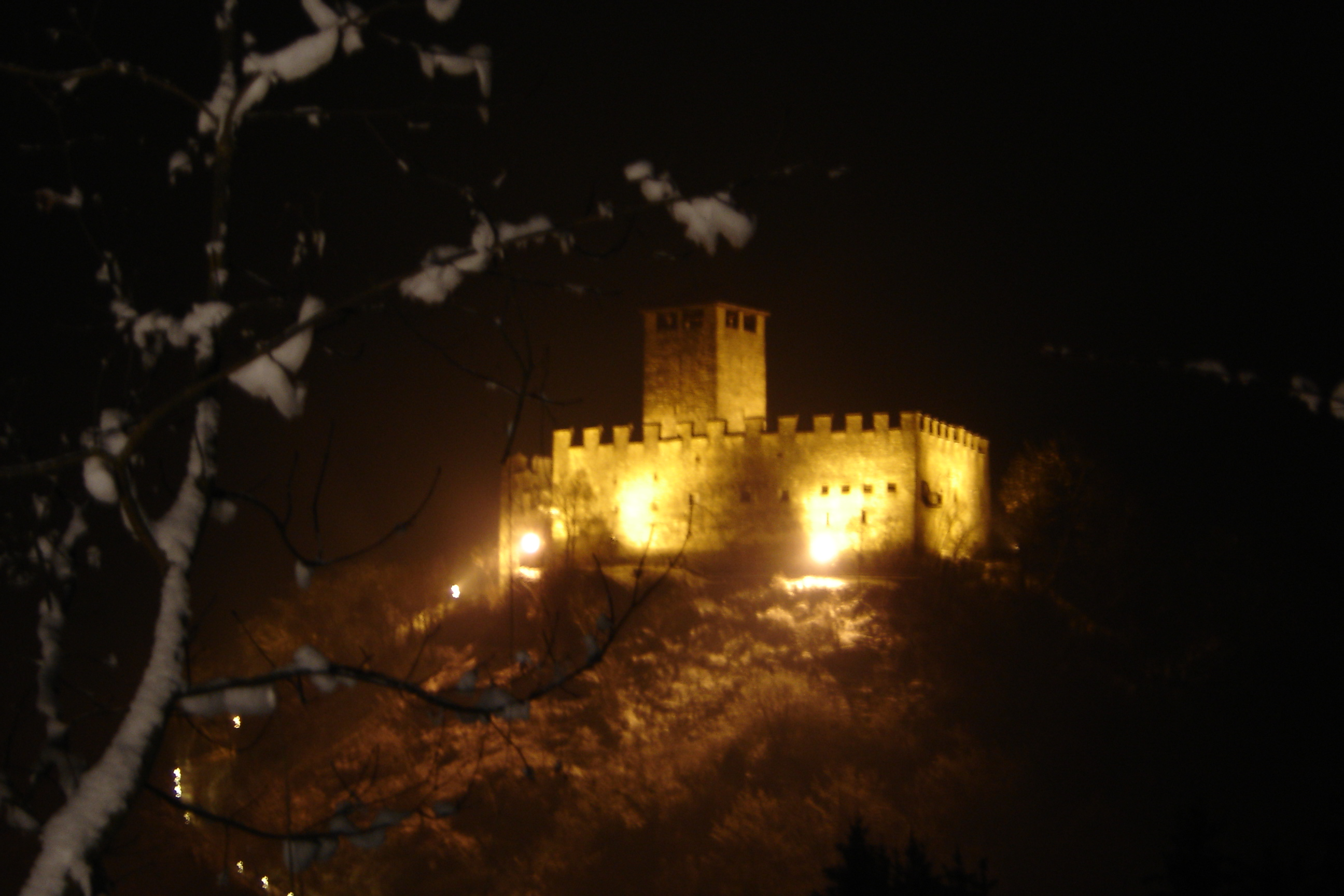 foto scattata da Jacobus